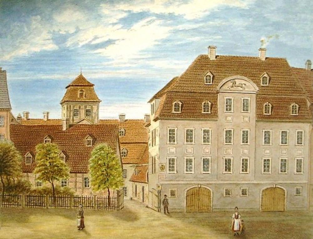 Das "Weiße Roß" am Roßplatz in Leipzig, der erste Ort der von Samuel Heinicke 1778 gegründeten Taubstummenschule